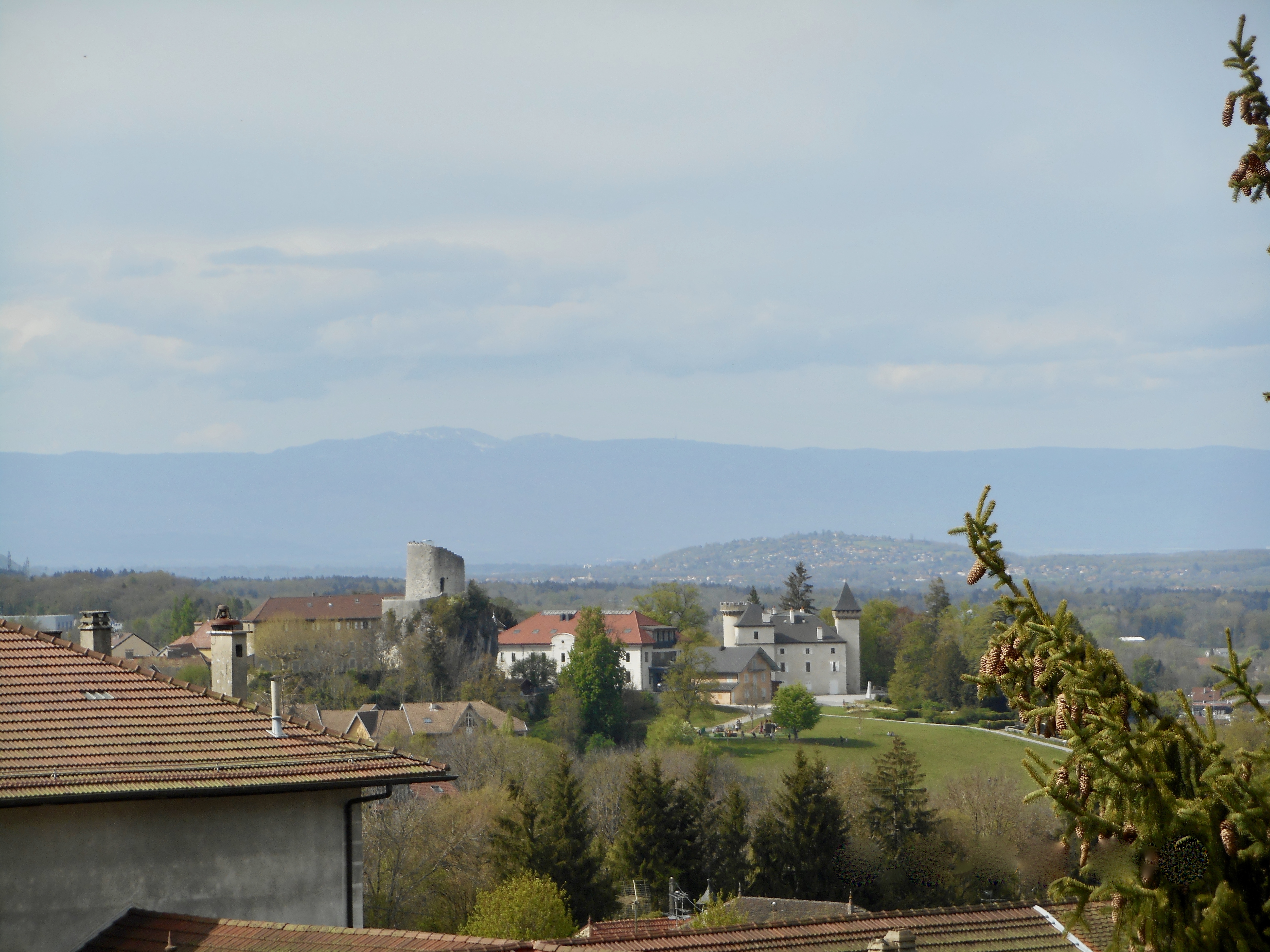 Vue sur la ville médiévale, avec le donjon et le château de l'Échelle, de La Roche-sur-Foron, depuis la Bénite Fontaine, printemps 2019.